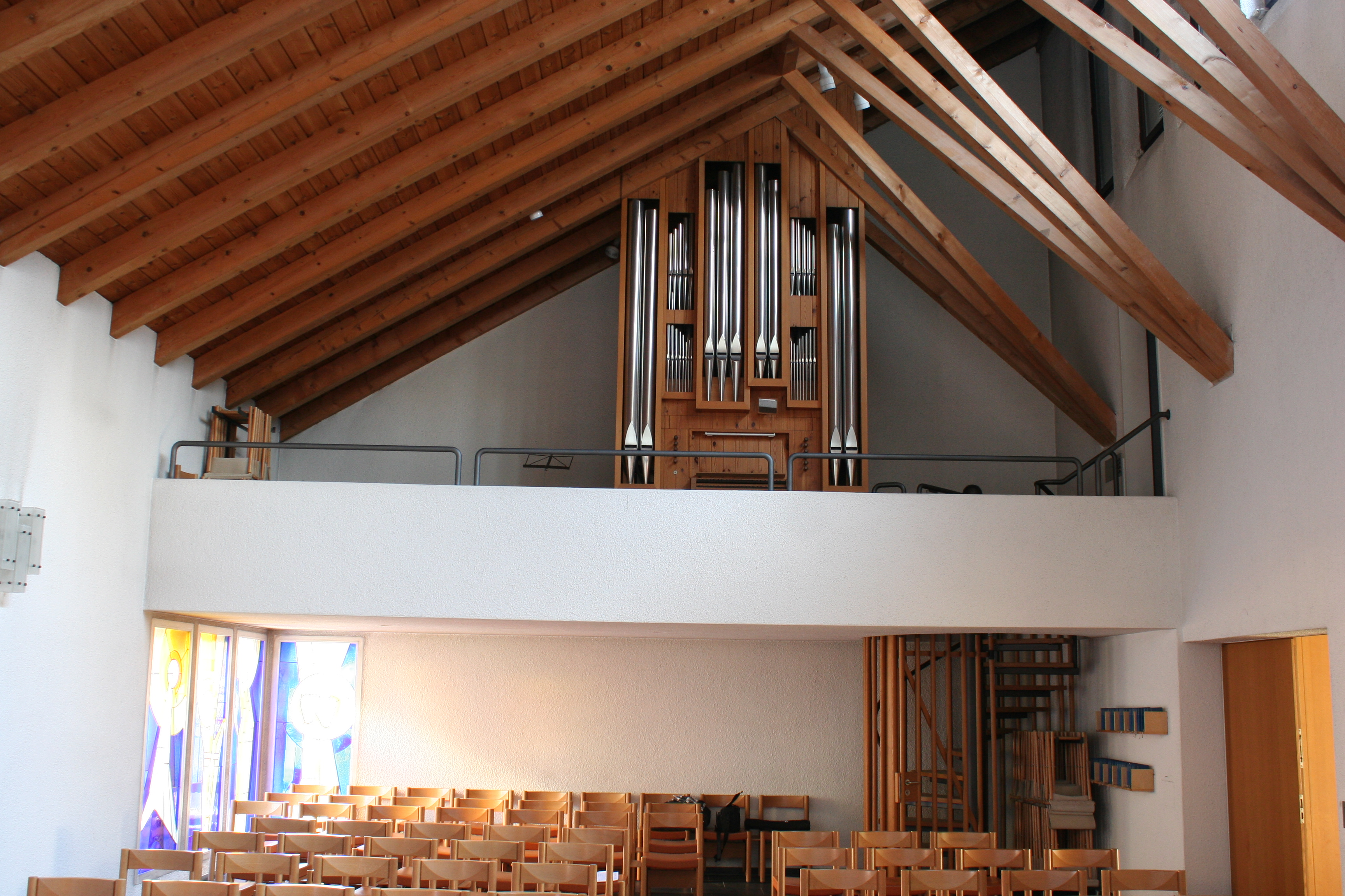 Römisch-katholische Kirche Bruder Klaus Zumikon Empore